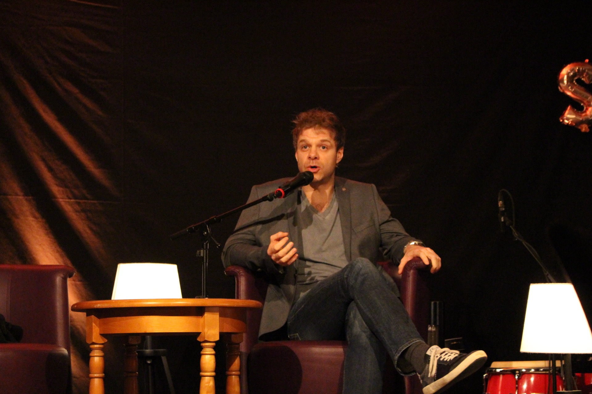 Benjamin Stoll als Interview-Gast beim Spring-Festival 2018 in Willingen